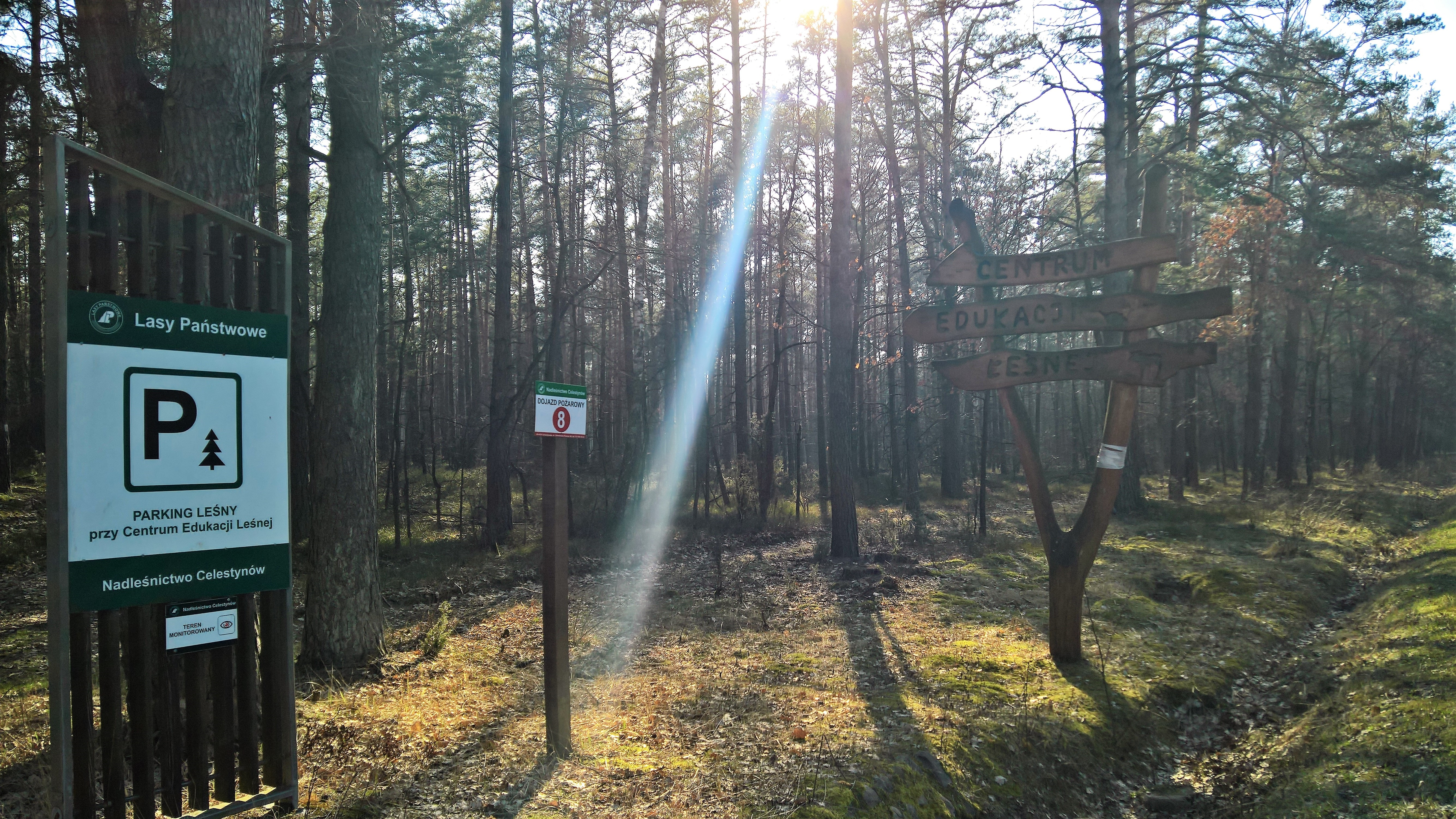 Znak informujący o Centrum Edukacji Leśnej.